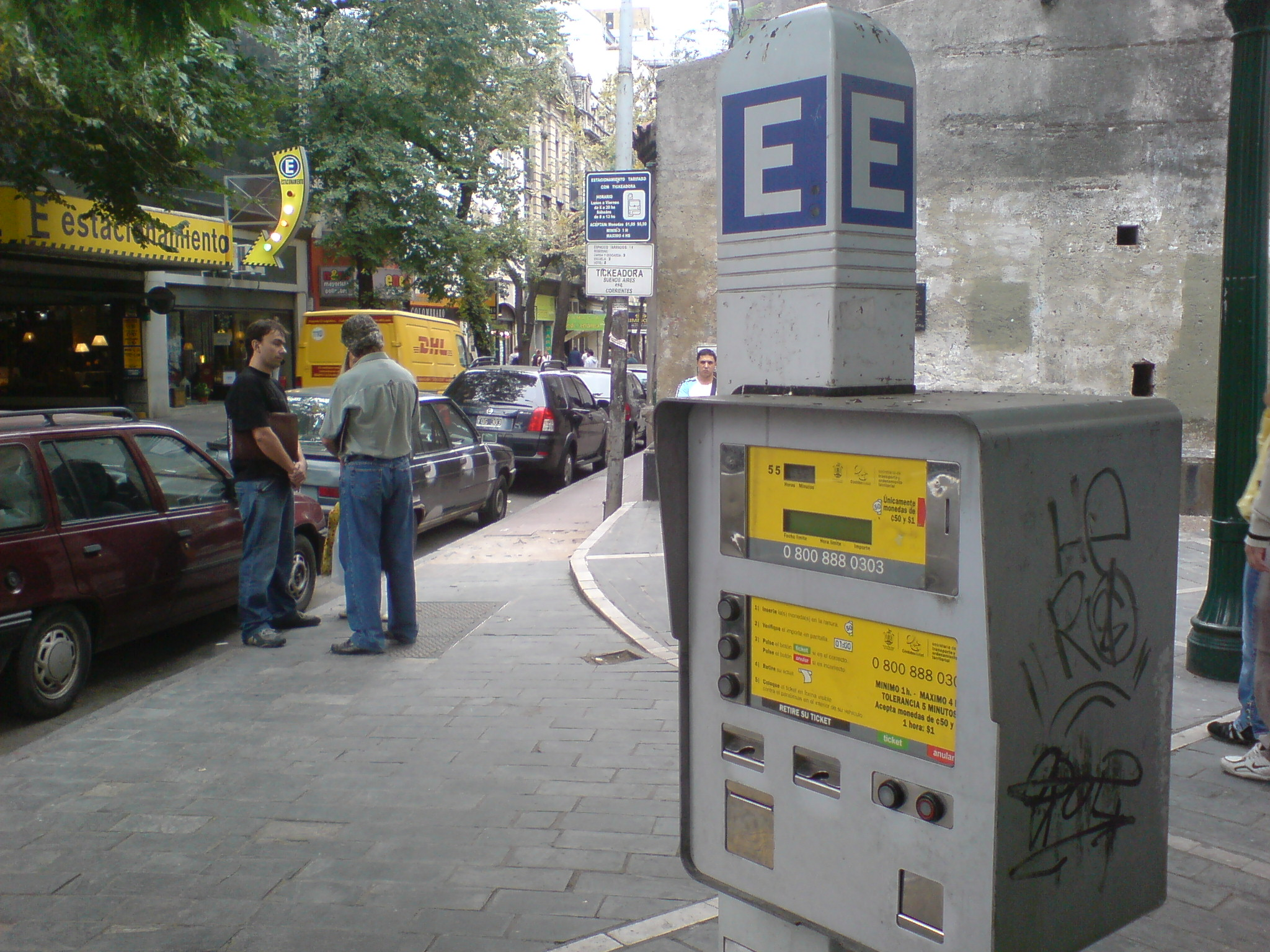 Parquímetro del tipo "central tiqueadora", en la ciudad de Córdoba, Argentina. El Sistema de Estacionamiento Medido (SEM) funciona con dos tipos de aparatos: el que aparece en esta fotografía es el que funciona como una tiqueadora.